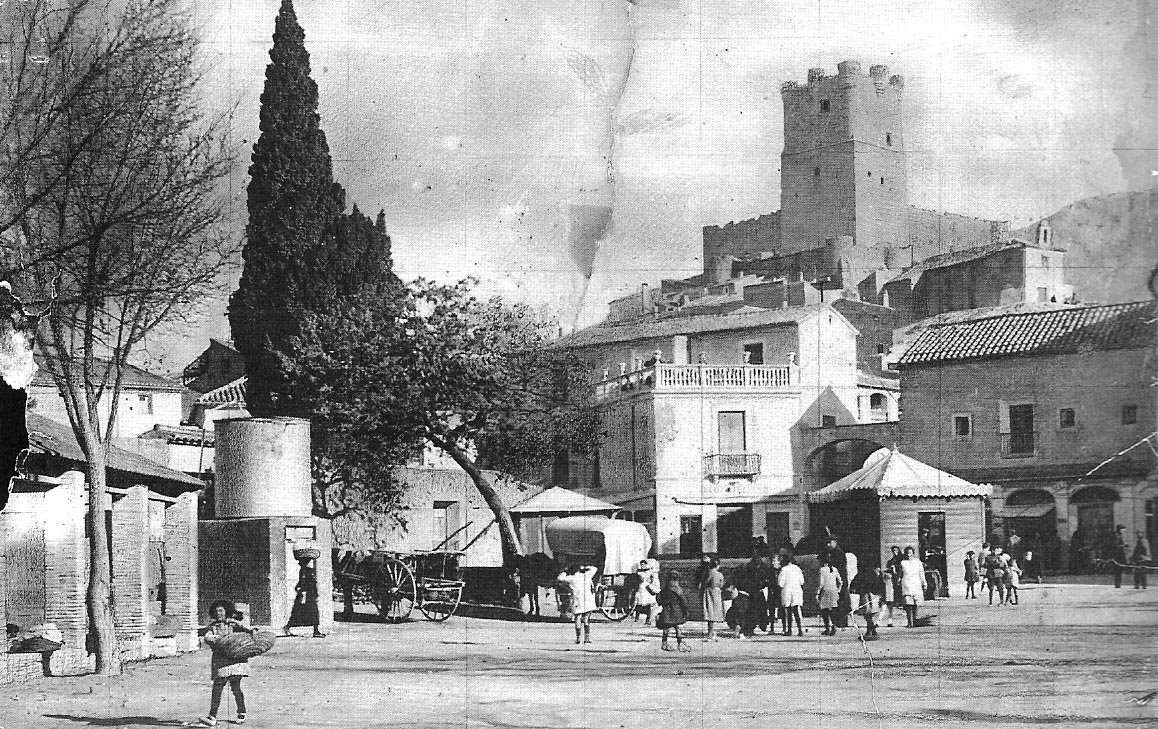 Plaza del Rollo, Castillo y ermita de Santa Bárbara de Villena